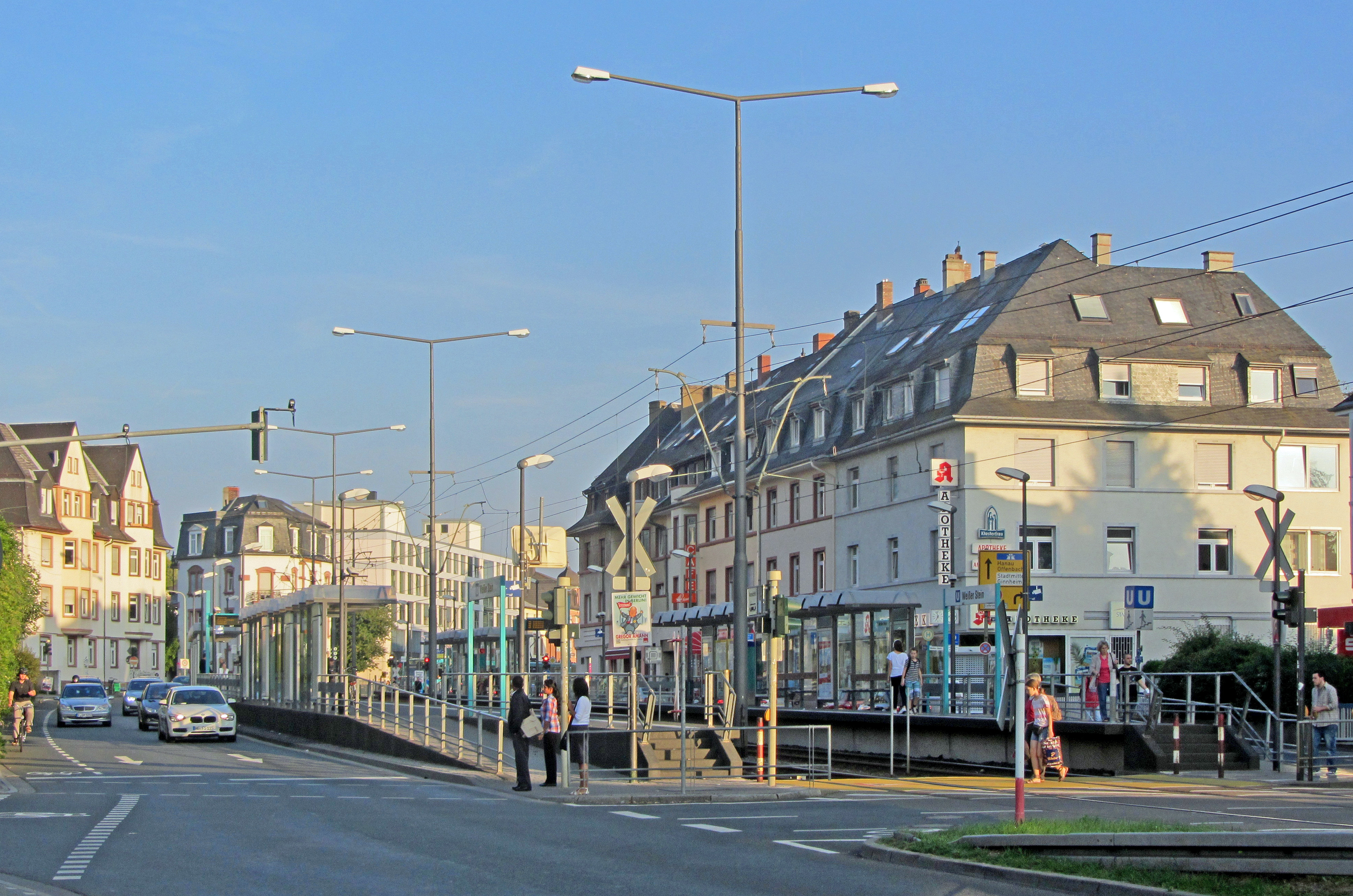 Ubahnstation Am Weißen Stein